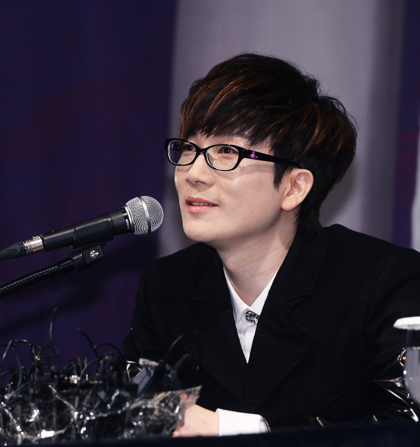 가수 서태지씨가 10월 20일 서울 그랜드인터콘티넨탈호텔에서 기자회견을 열었습니다.